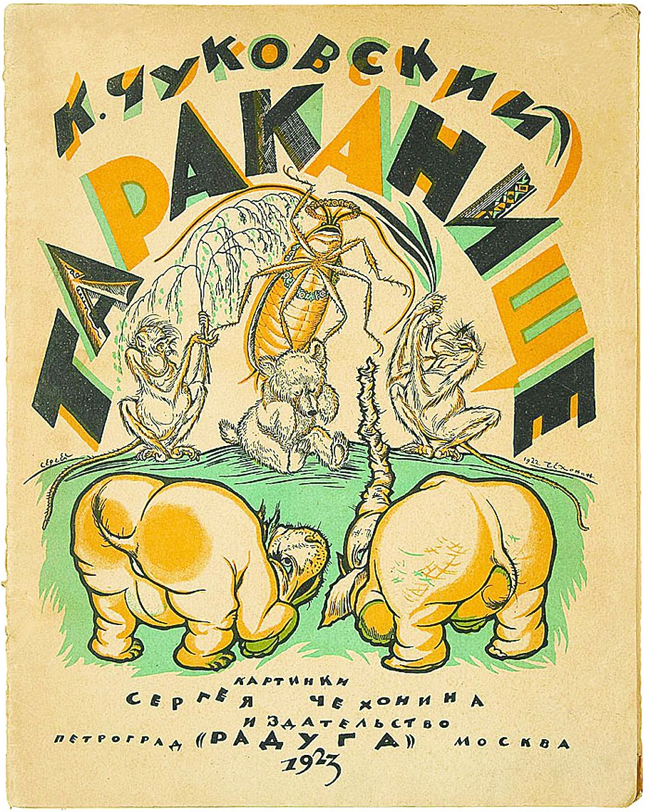 Чуковский К. Тараканище, 1923.png